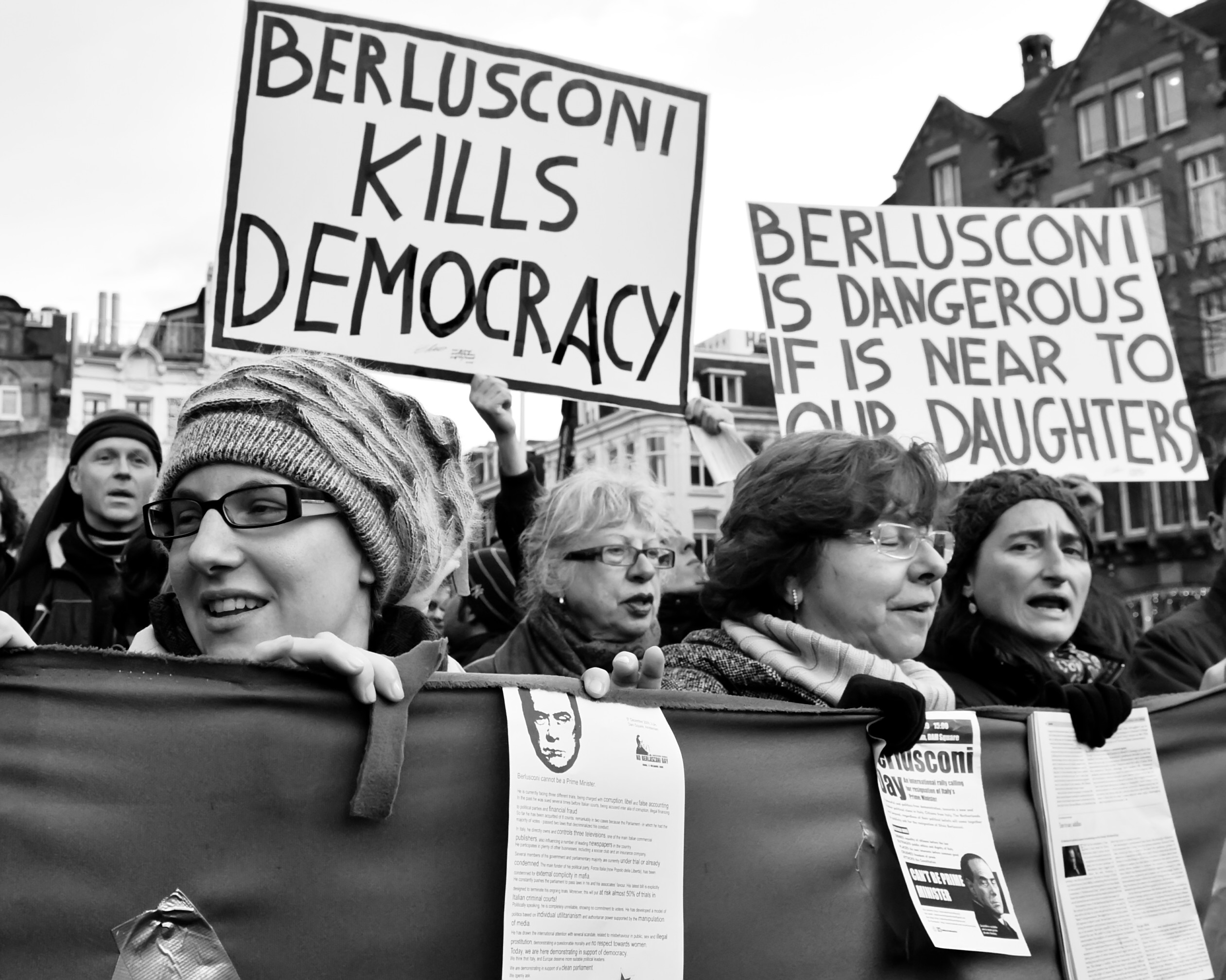 AMSTERDAM - Italianen demonstreren tegen Berlusconi op de Dam. Italian protest in Amsterdam, "No Berlusconi Day"